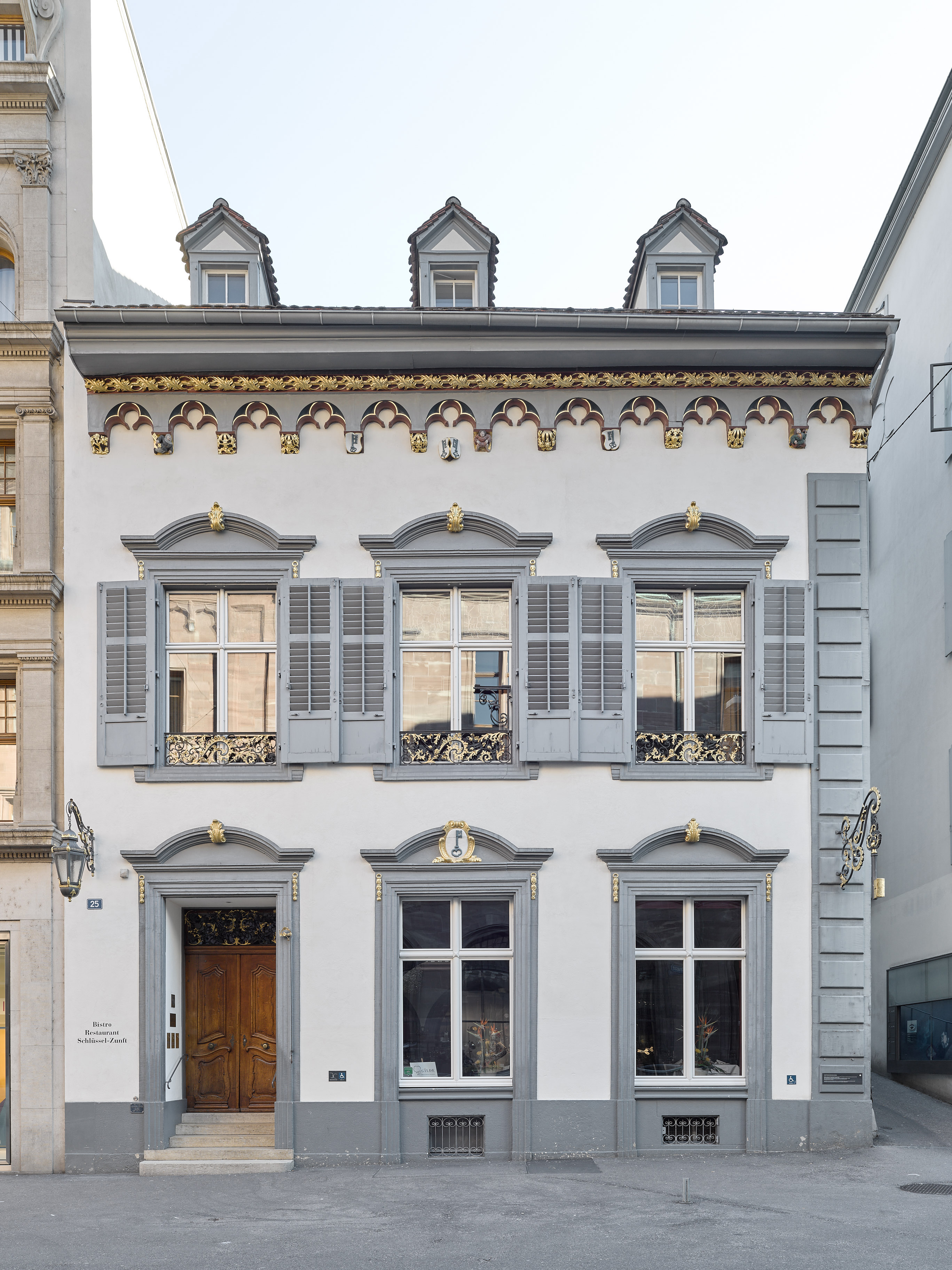 Freie Strasse 25, seit Anfang des 15. Jahrhunderts Sitz E. E. Zunft zum Schlüssel (Bild: Peter Schulthess)